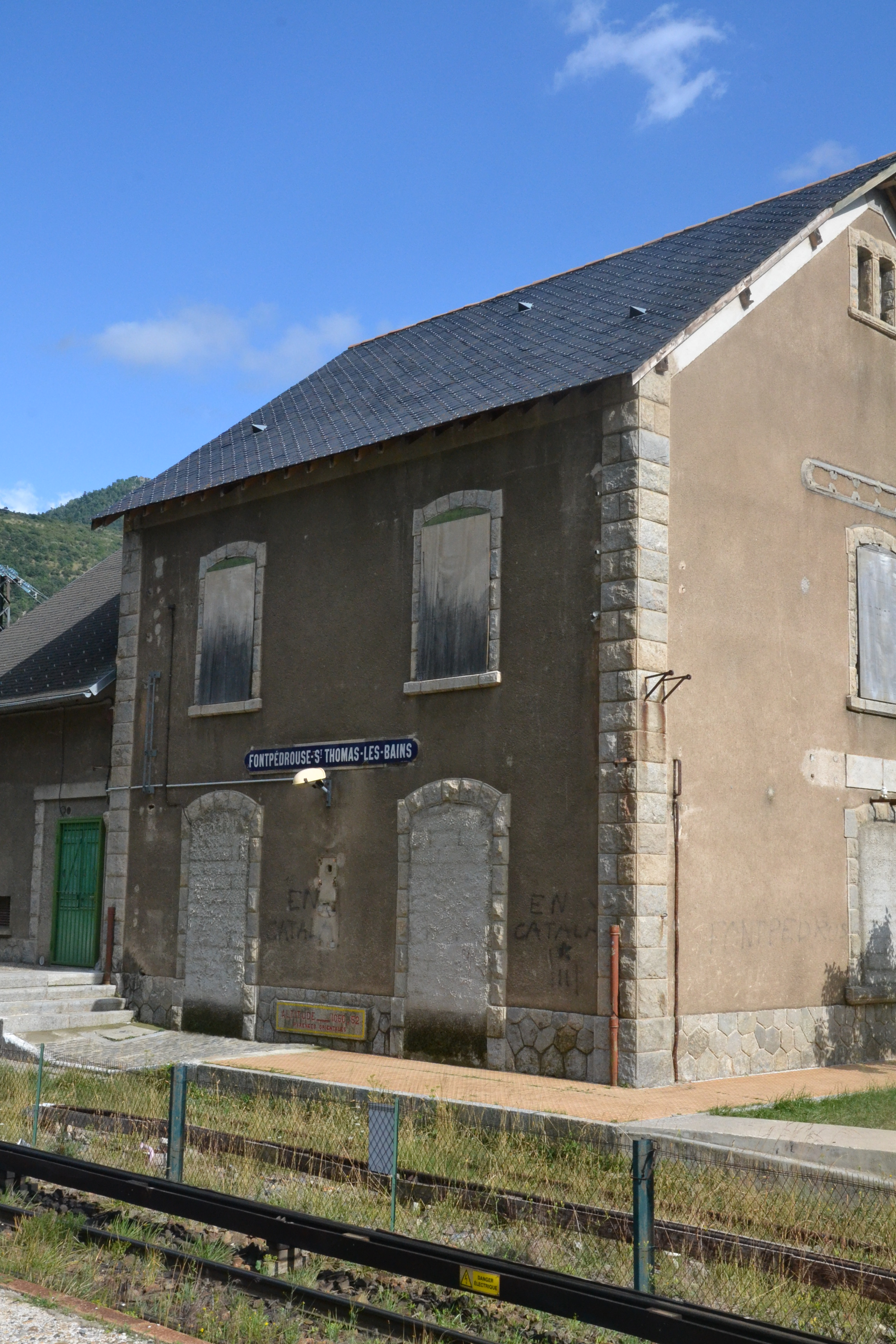 Gare de Fontpédrouse-Saint-Thomas-les-Bains (Fontpédrouse, Pyrénées-Orientales, France).